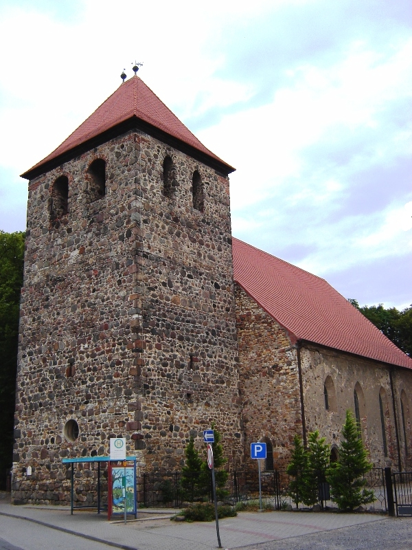 Stadtkirche von Möckern (Sachsen-Anhalt)